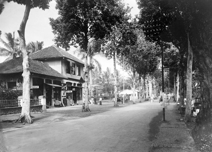 Repronegatief. Hoofdweg van Garoet, links de apotheek, Preanger